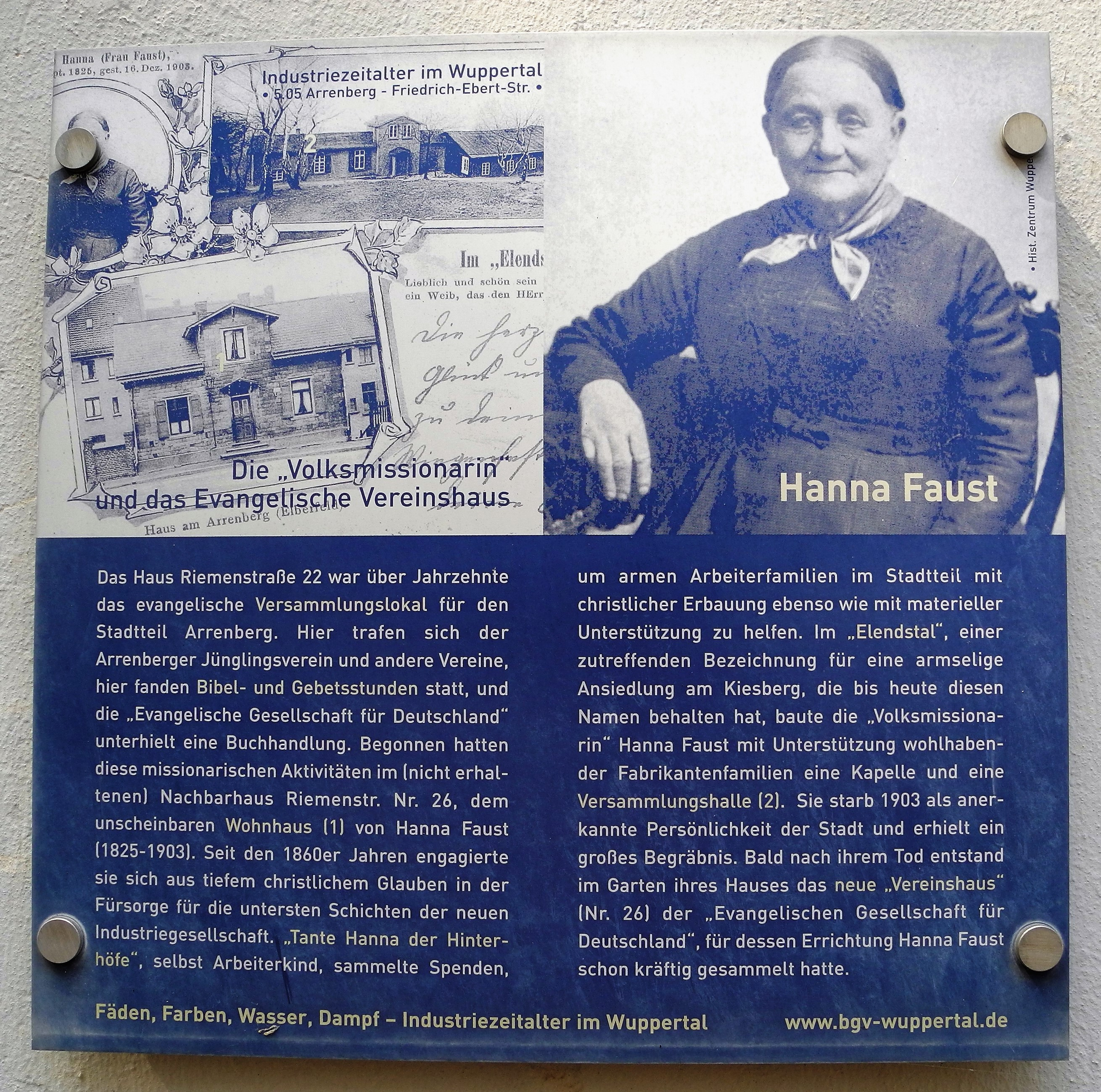 Wuppertal, Wohnquartier Arrenberg, Riemenstr. 22, Info-Tafel über die 'Volksmissionarin' Hanna Faust